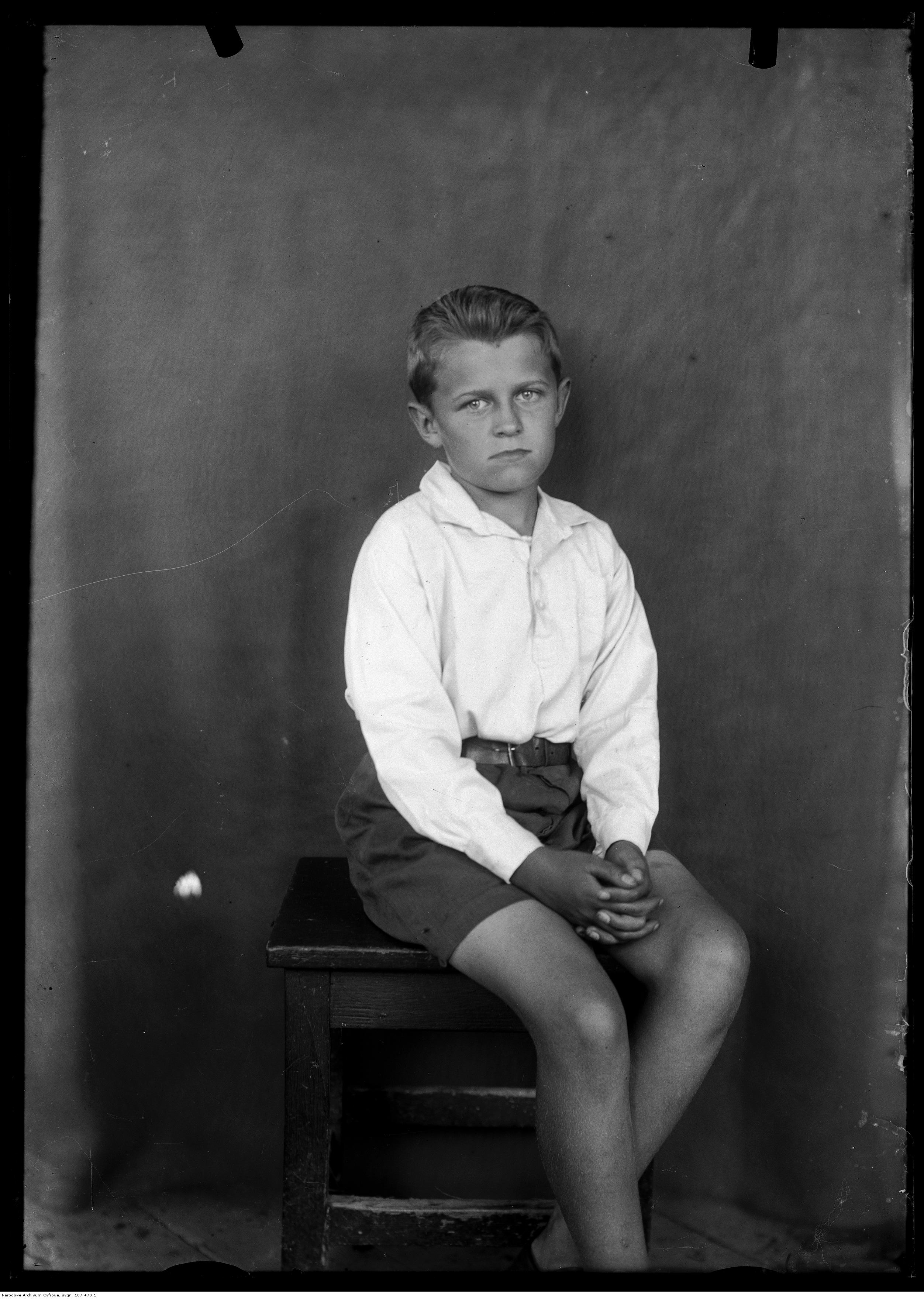 Portret siedzący (cała postać).